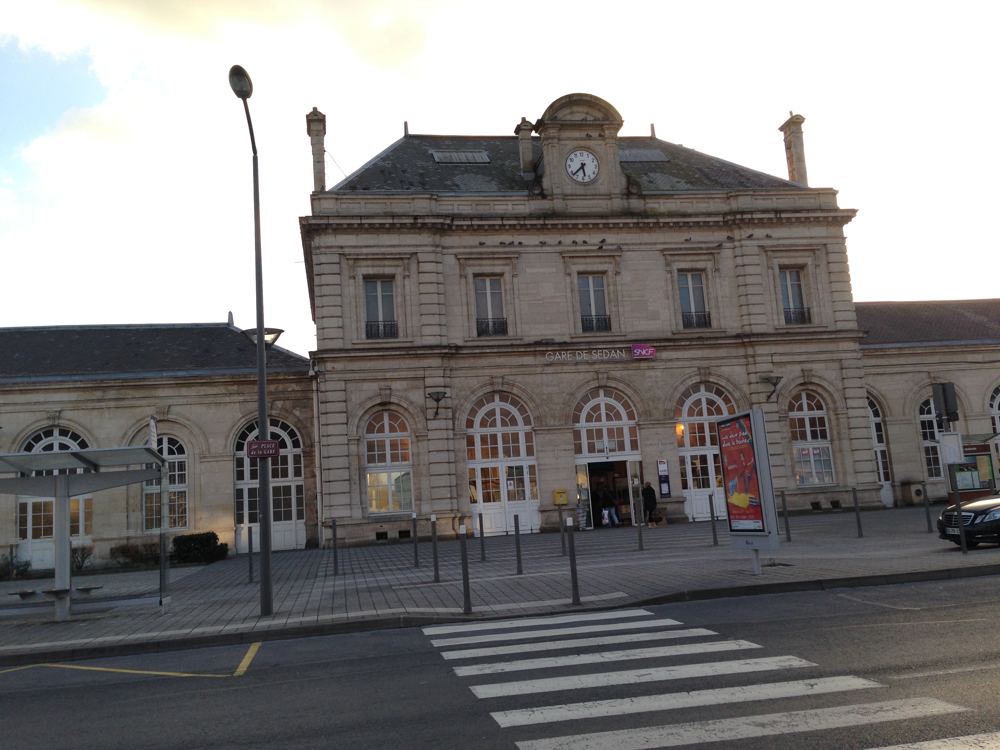 法国色当站